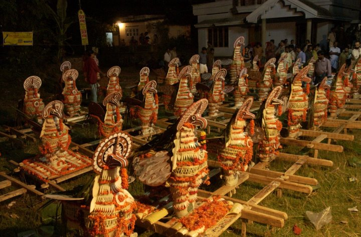 Thengamuri